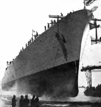 Il Garibaldi sullo scalo